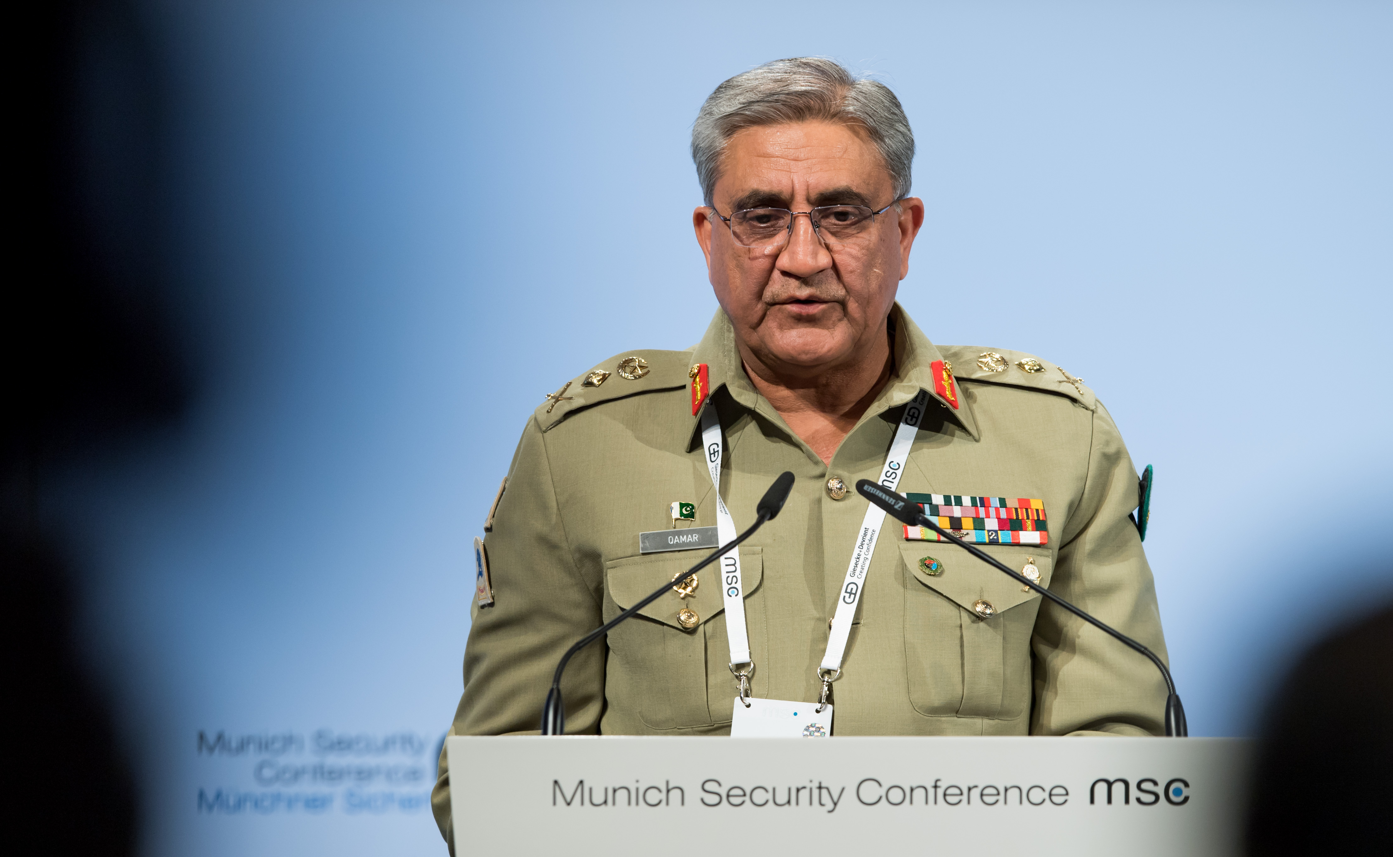 Qamar Javed Bajwa während der Münchener Sicherheitskonferenz 2018